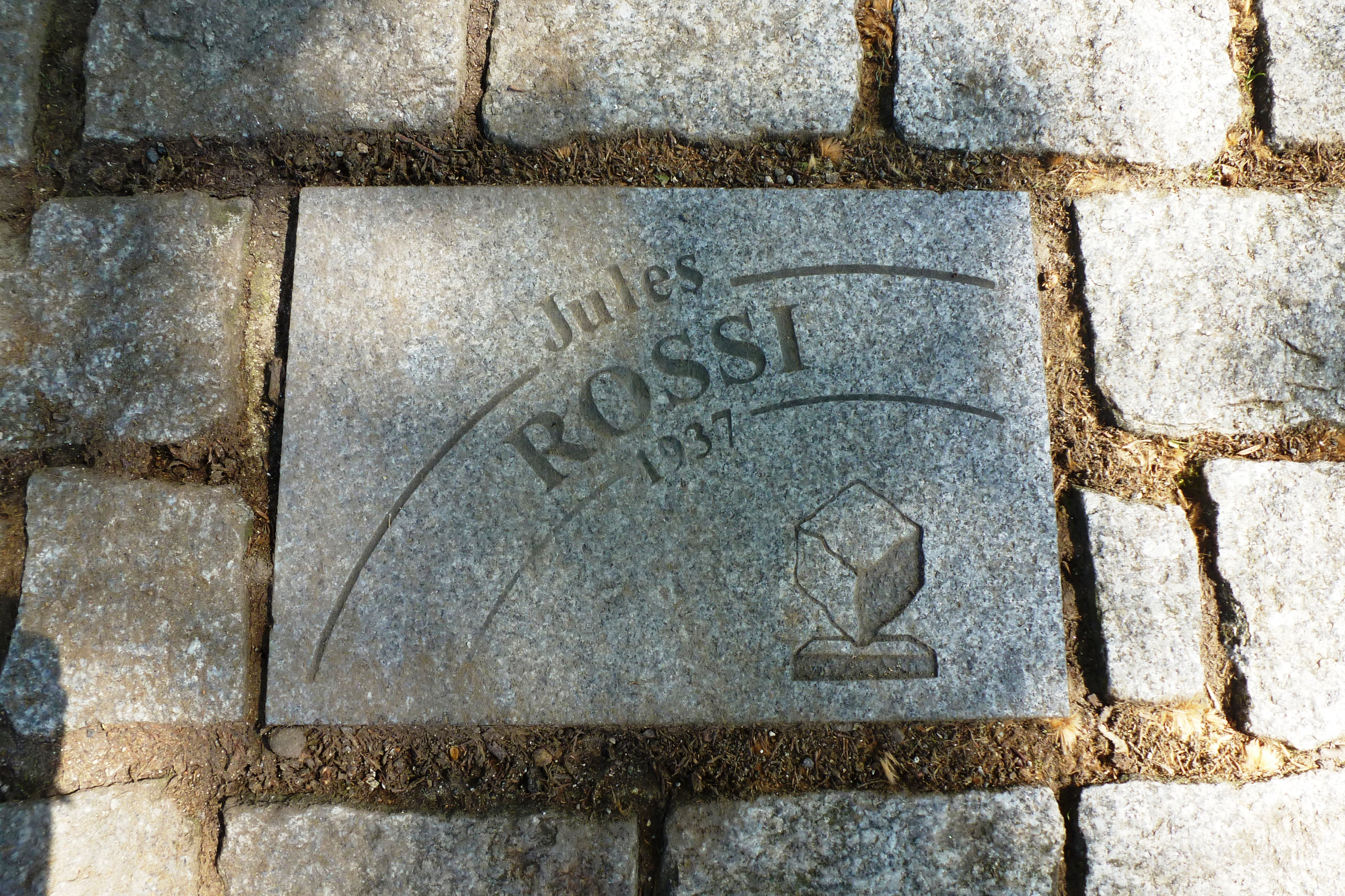 Pflasterstein für Jules Rossi auf der Allée Charles Crupelandt in Roubaix